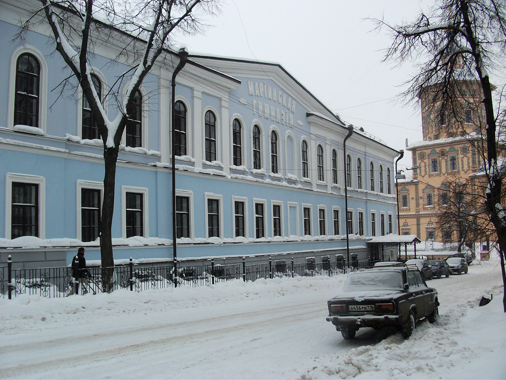 Здание бывшей Казанский мариинской гимназии